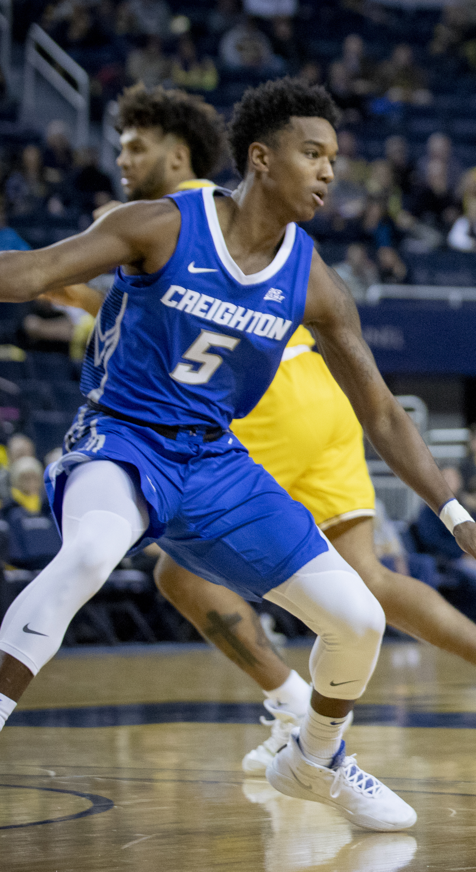 _O6A6839